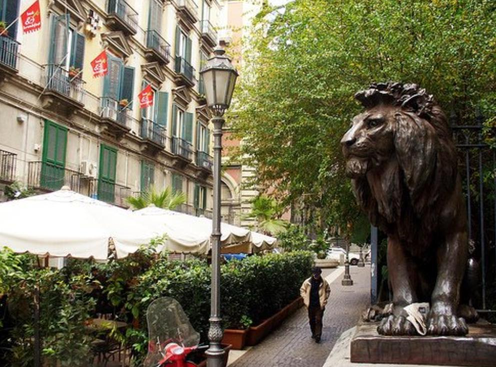 Uno dei due Leoni posti all'ingresso dell'Accademia delle Belle Arti a Napoli